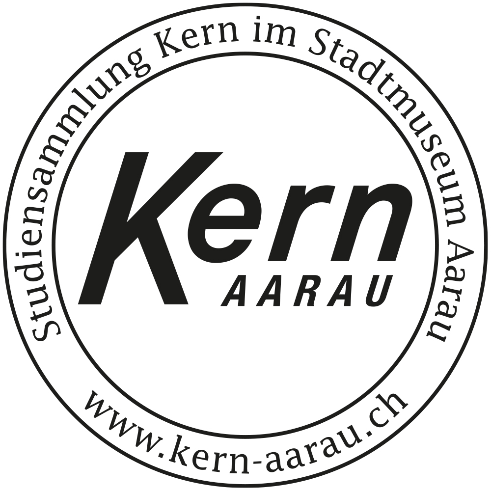 Logo der Studiensammung Kern